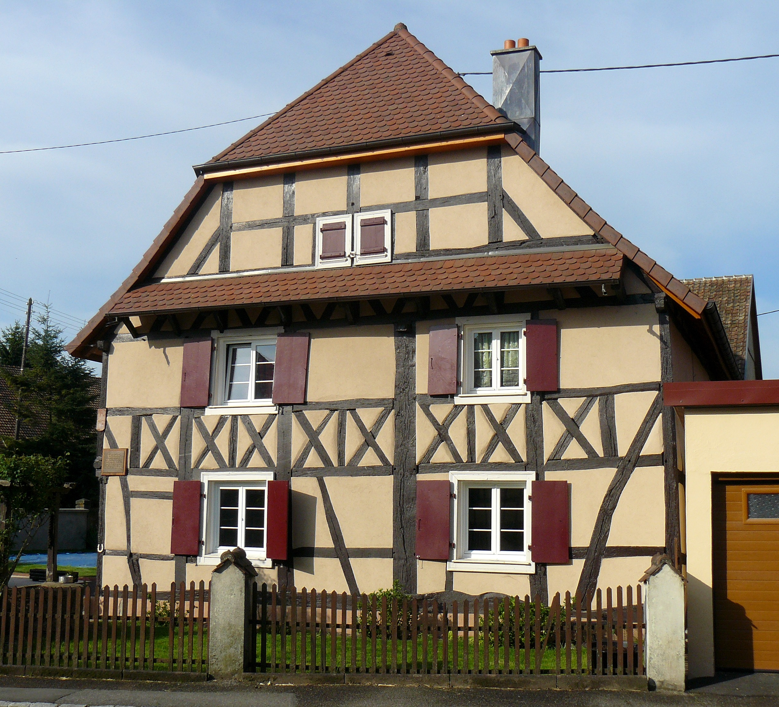 Maison ancienne à Reiningue (Haut-Rhin, France)